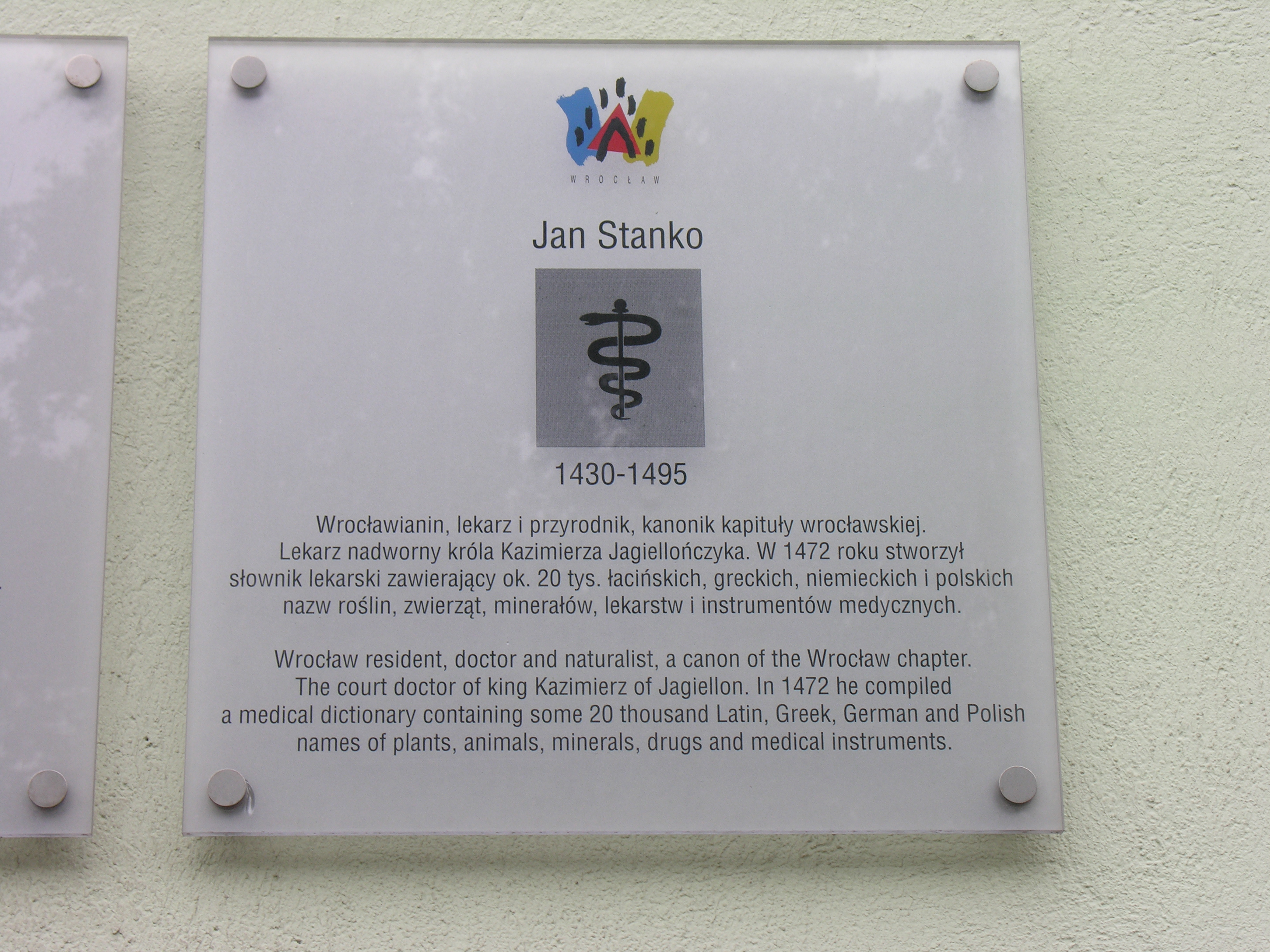 Tablica ku czci Jana Stanki we Wrocławiu, ul. Sienkiewicza 23